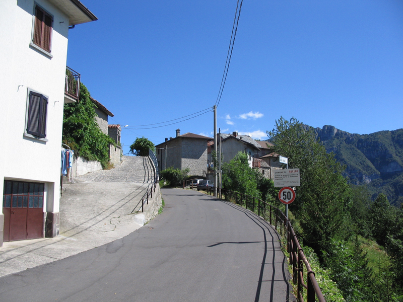 Blello, provincia di Bergamo, panorama.